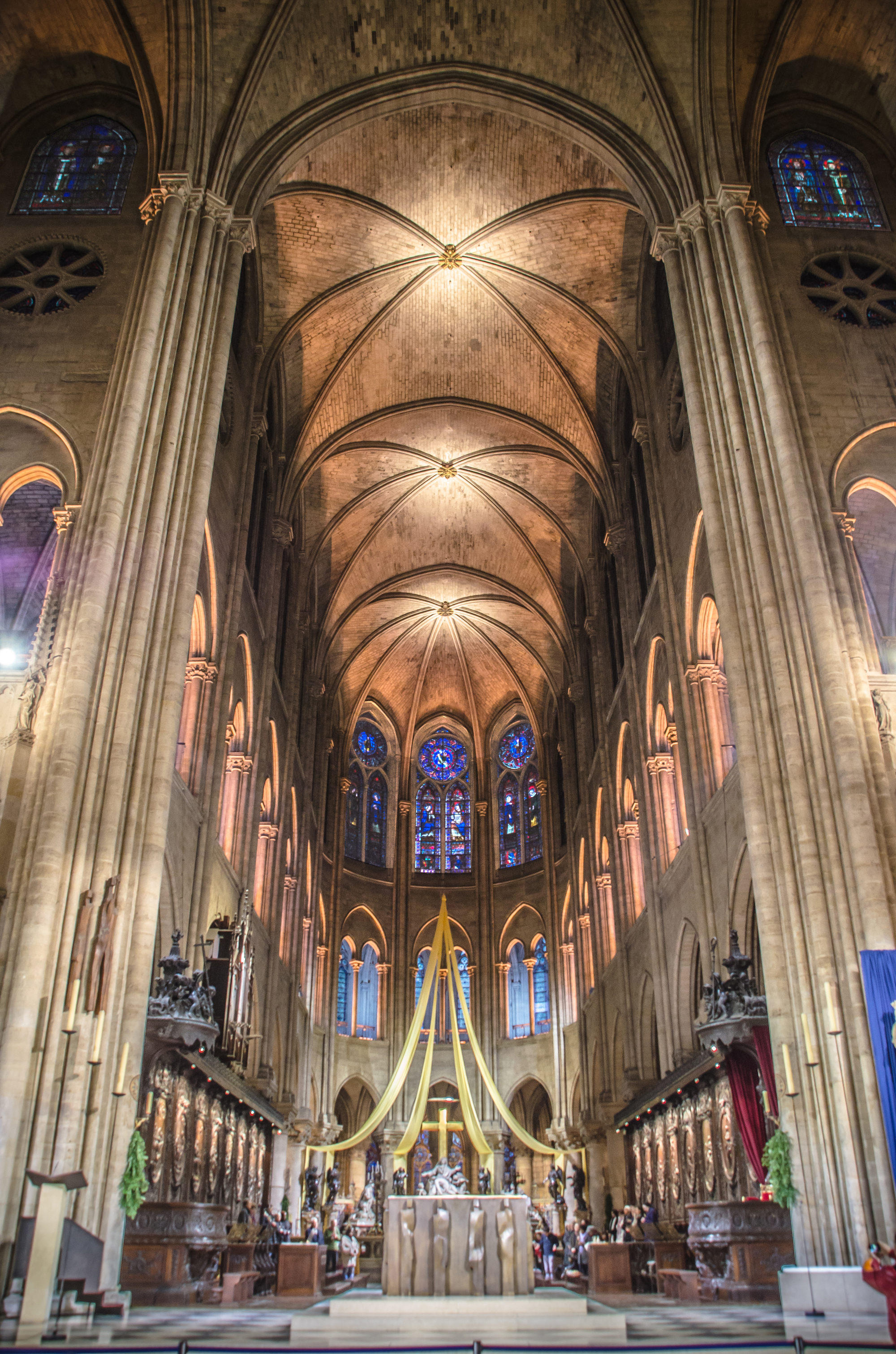 Cathédrale Notre-Dame